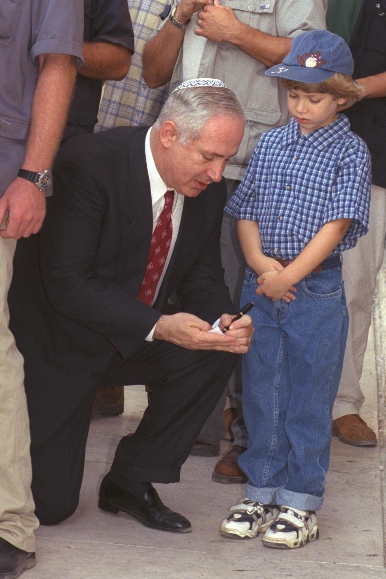 Prime Minister Benjamin Netanyahu and his son Yair visit the Western Wall in Jerusalem during the eve of Rosh Hashanah. ראש הממשלה בנימין נתניהו ובנו יאיר כותבים פתק כדי להכניסו בין אבני הכותל המערבי, בערב חג ראש השנה. Photo by Ohayon Avi, GPO.